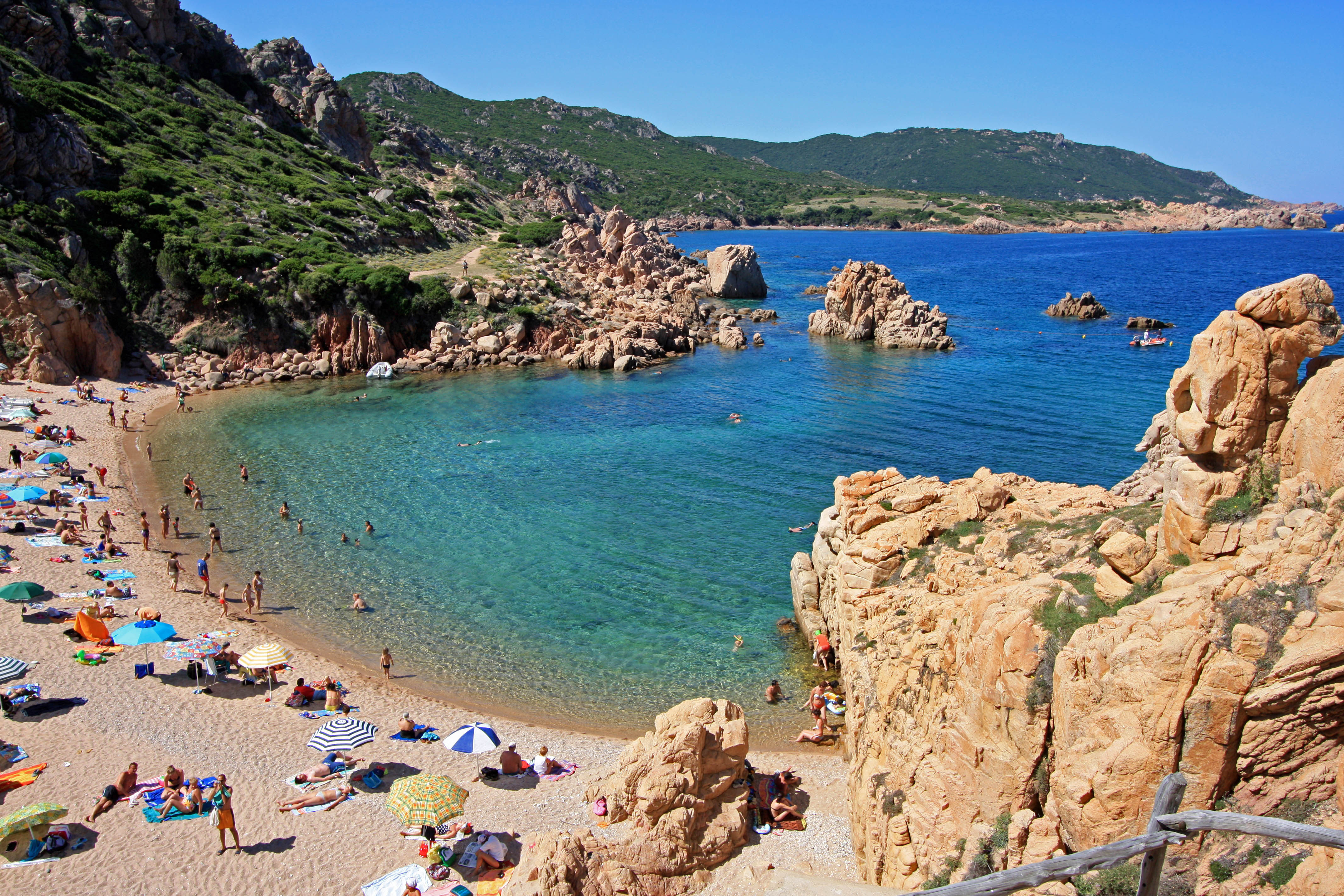 Costa Paradiso: spiaggia di Li Cossi